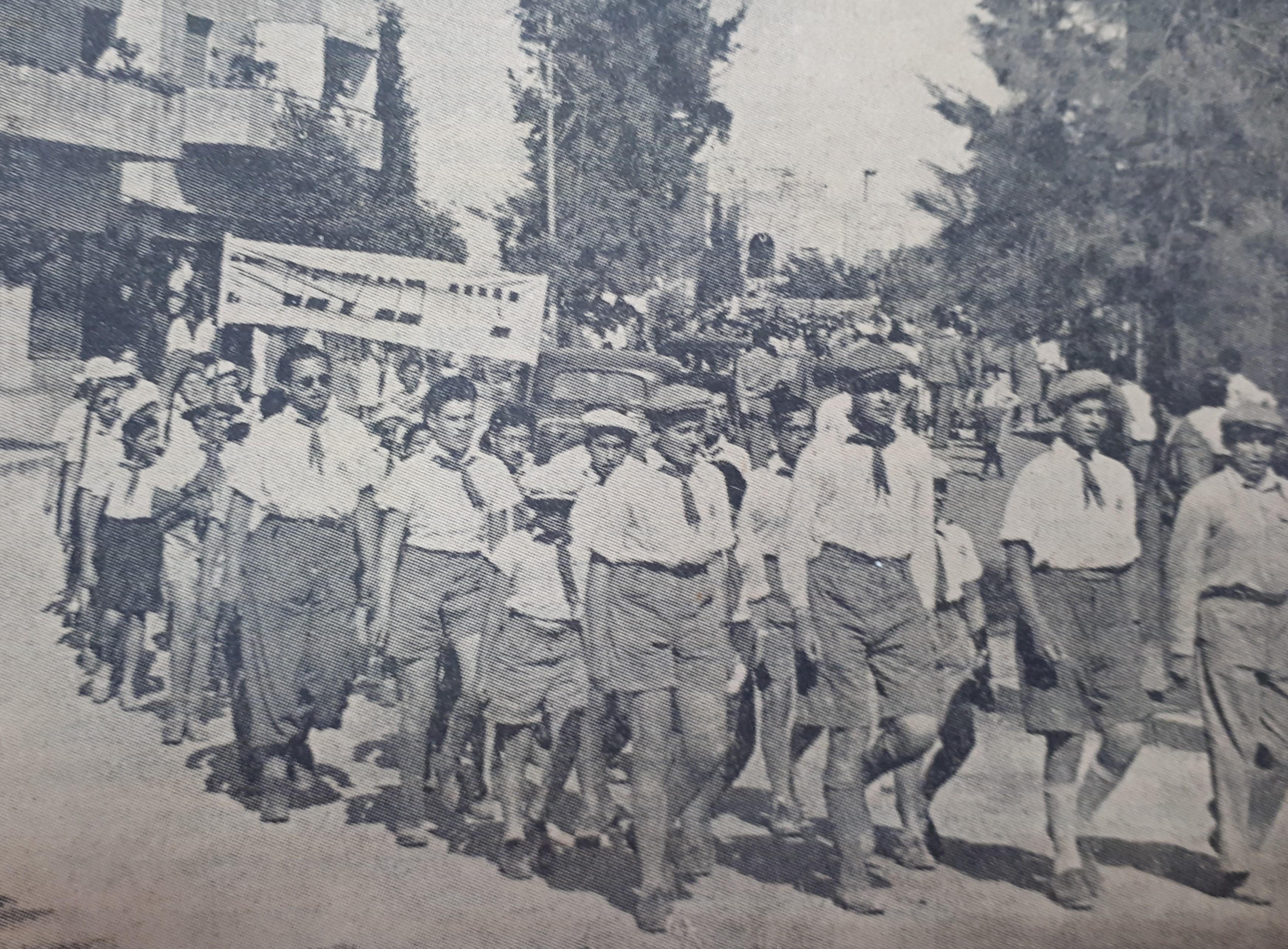 סניף ירושלים בהפגנה נגד הספר הלבן - 1938